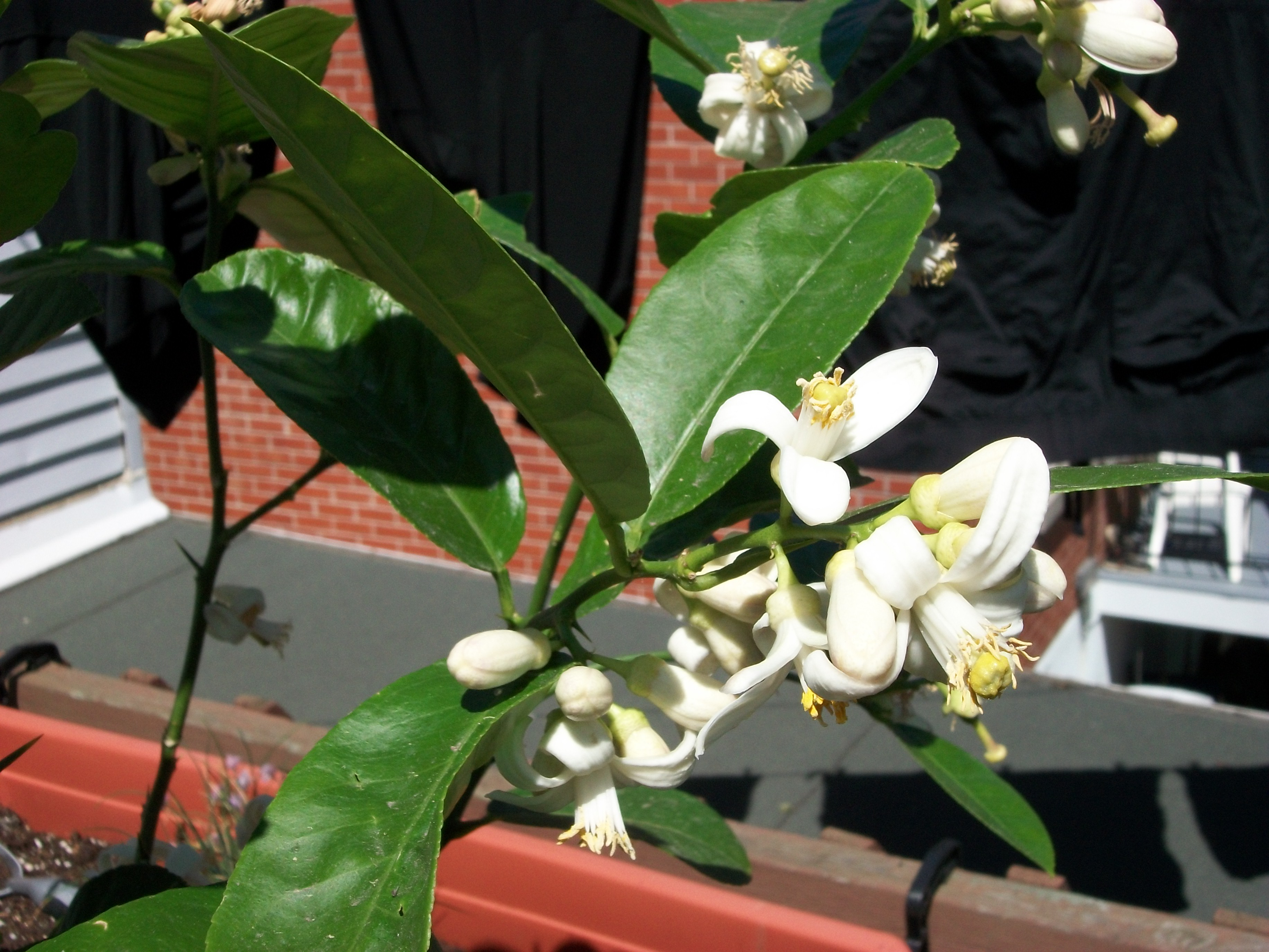 Voici l'arbre en fleur, les pétales de la fleur, ressemble a de la pelure de citron.